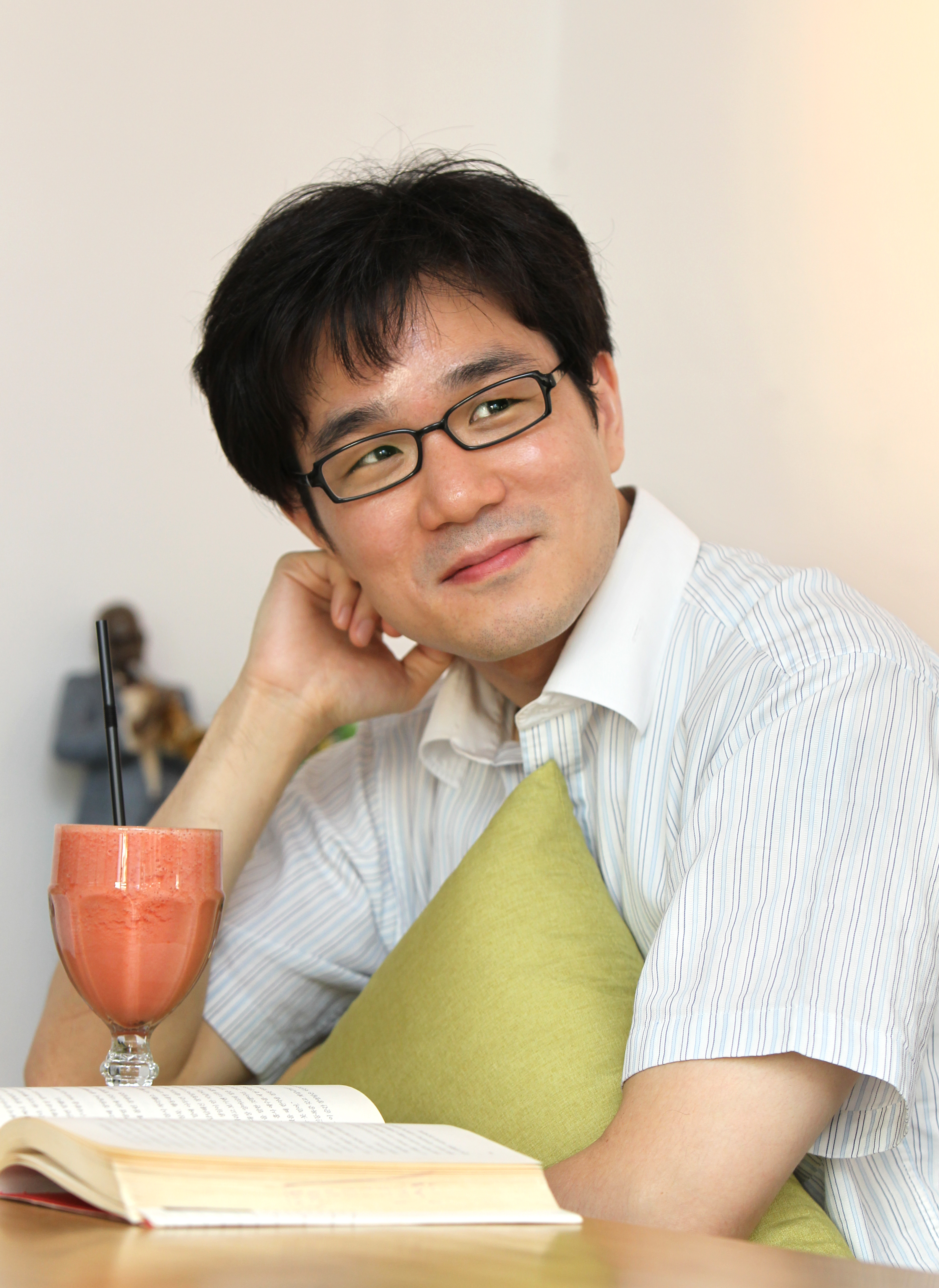 소설가 장강명